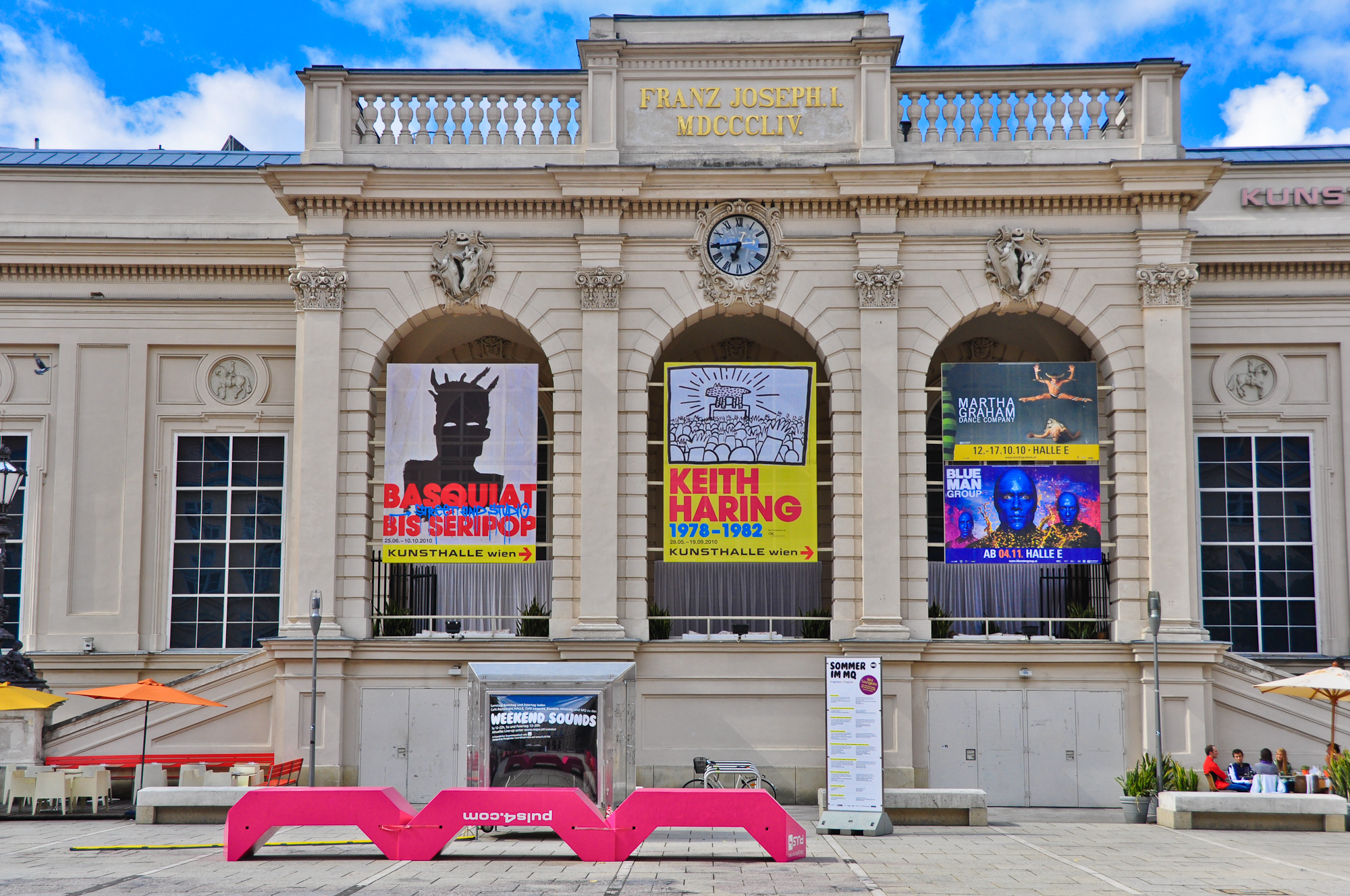 Österreich, Wien, Museumsquartier, Kunsthalle